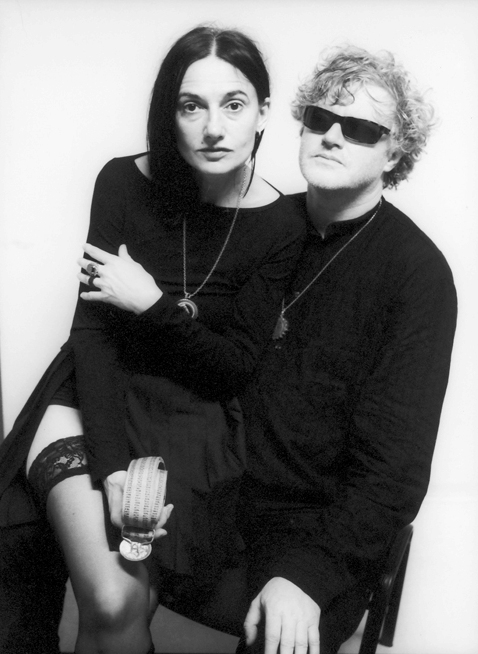 Bárdos Deák Ágnes és Müller Péter a Kontroll Csoport énekesei.